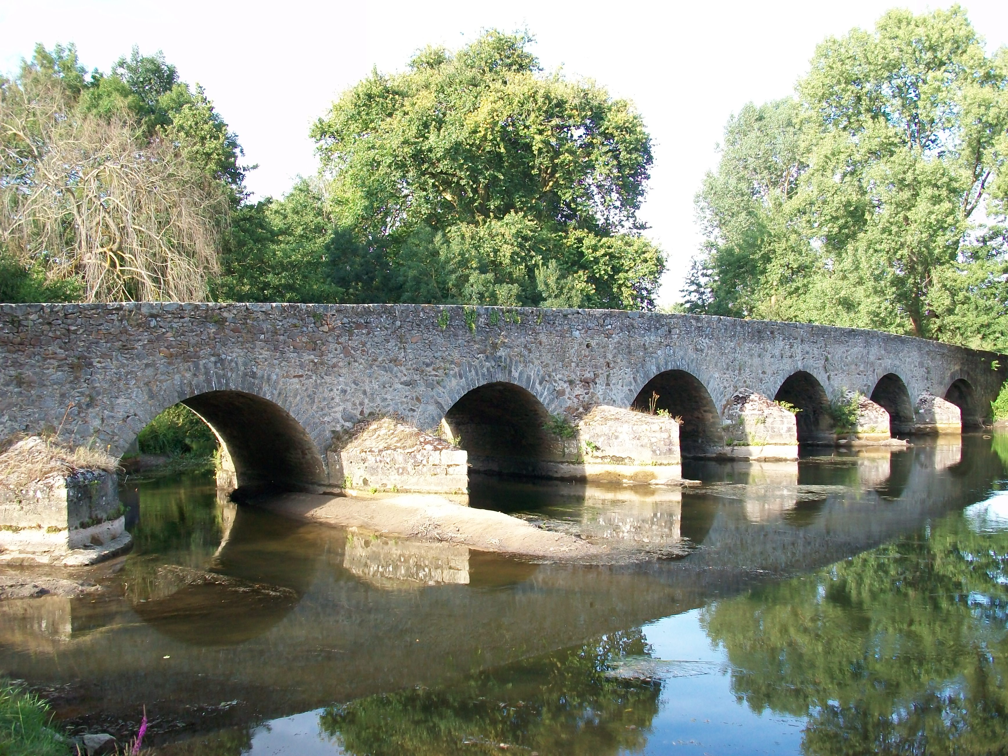 Le Pont Romain d'Yvré l'évêque, à l'est du Mans. Pont ancestral de la commune.